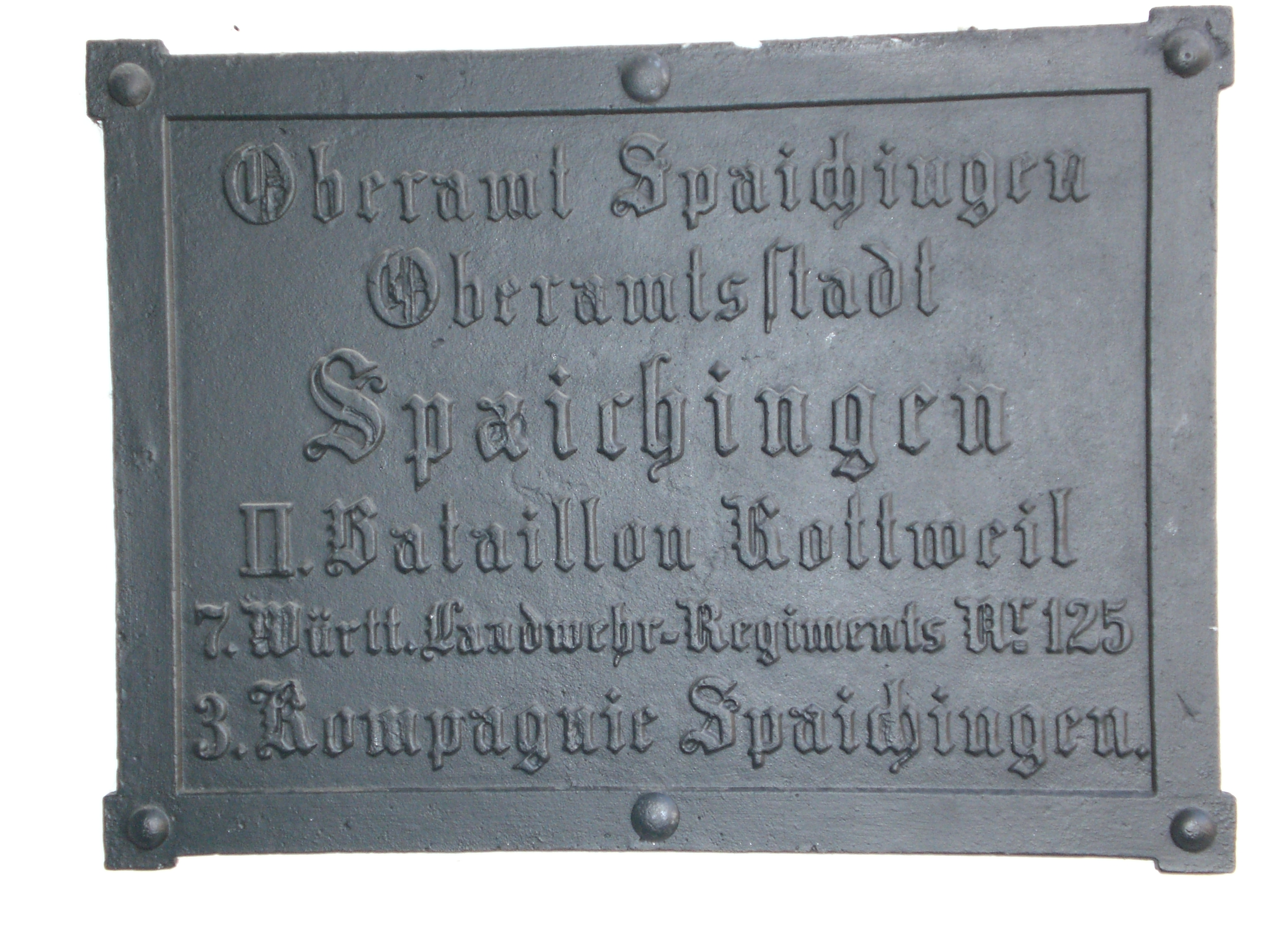 Es handelt sich um eine Ortstafel mit Hinweisen auf die Landwehr- Bataillons- und Kompanie-Bezirke. Diese Schilder wurden vom württembergischen Hüttenwerk in Wasseralfingen angefertigt. Die Tafeln sind aus Gusseisen mit den Maßen 50 x 65 cm. In ihrem Originalzustand war der Untergrund weiß gestrichen und die Schrift schwarz hervorgehoben. Die Umrandung der Tafel war bronziert. Diese Ortstafeln waren entweder am Rathaus oder an einem zentral gelegenen öffentlichen Gebäude angebracht. Historic sign of the city of Spaichingen/Wuerttemberg. It shows the political district "Oberamt" (county), its name and the military district of "Landwehr" (Royal Wuerttemberg Reserve Army), its battalion and company.